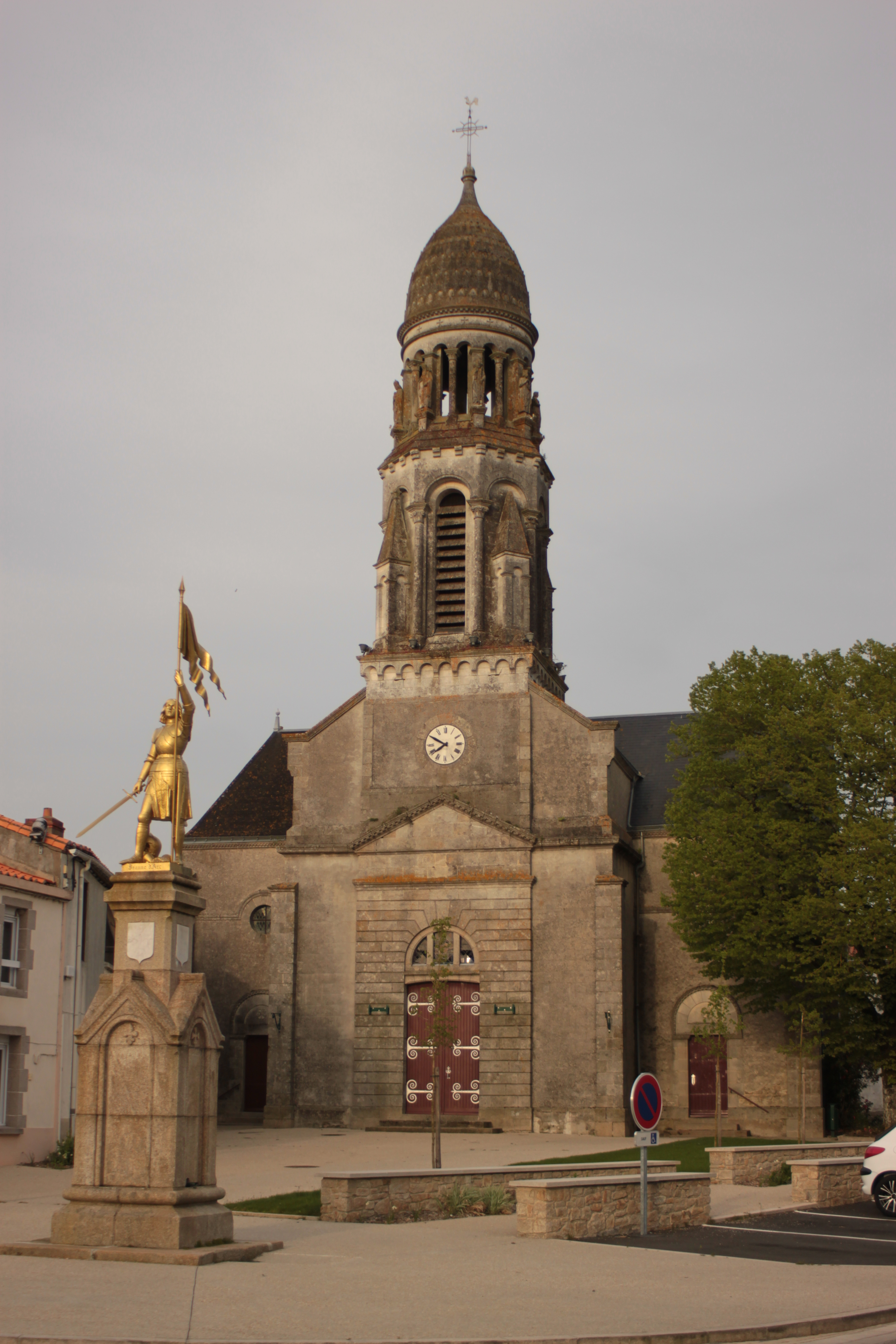 Église Saint-Martin (1891), Fr-85-Saint-Martin-des-Tilleuls.